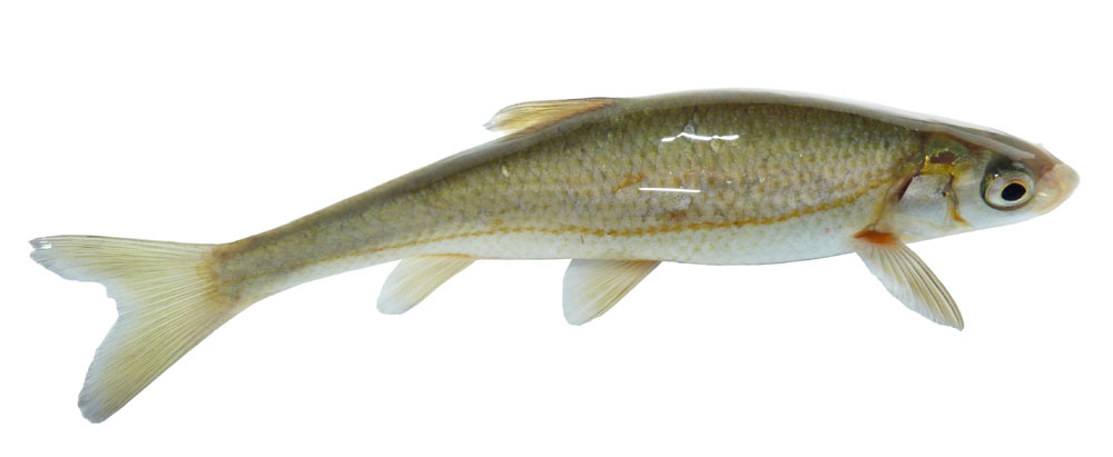 Blageon (Leuciscus souffia) capturé lors d'une pêche électrique sur le fleuve Hérault (Laroque, Hérault, France)